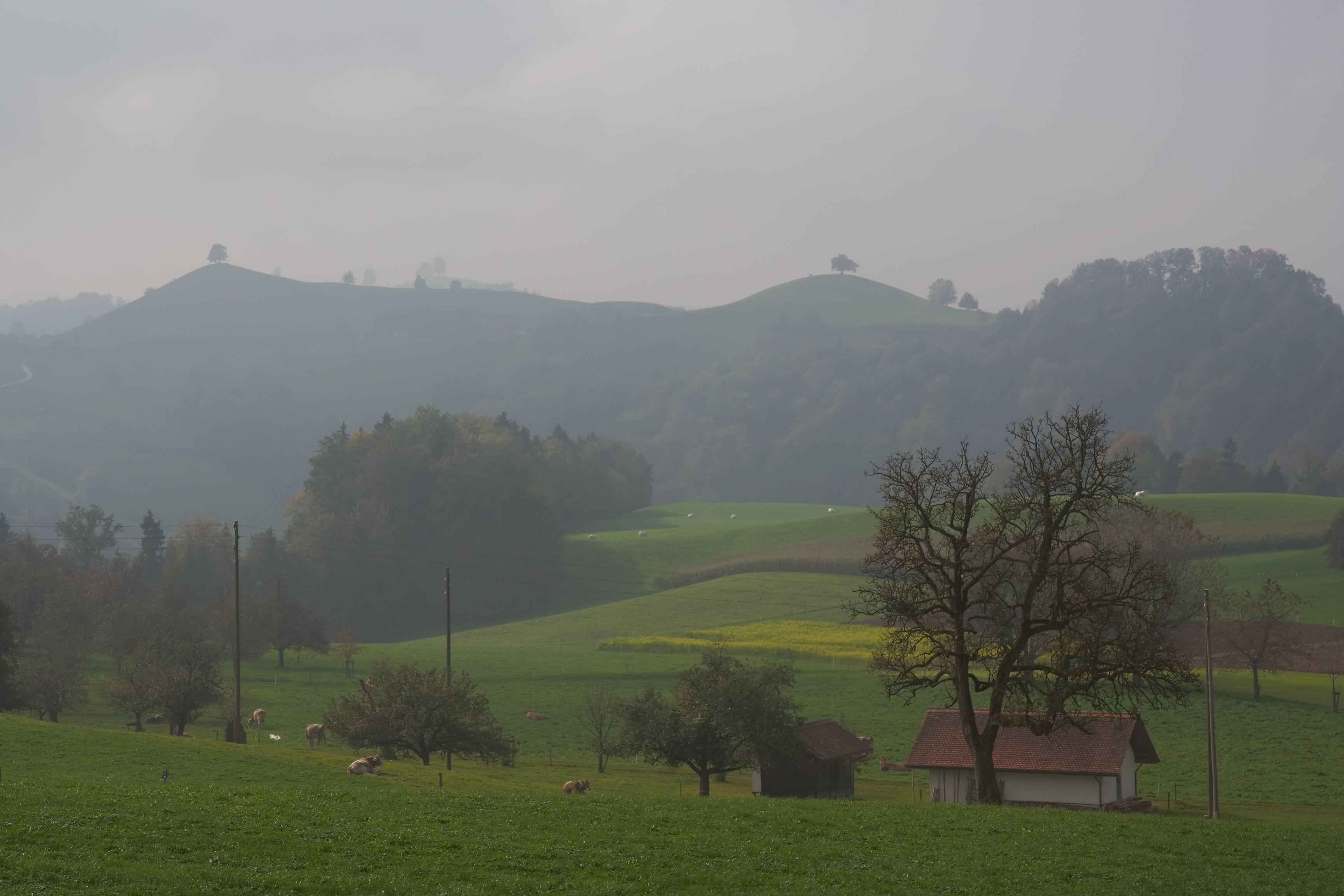 Drumlinlandschaft in Hirzel, SchweizTypisch sind die einzelnen Laubbäume zuoberst auf den Drumlins.